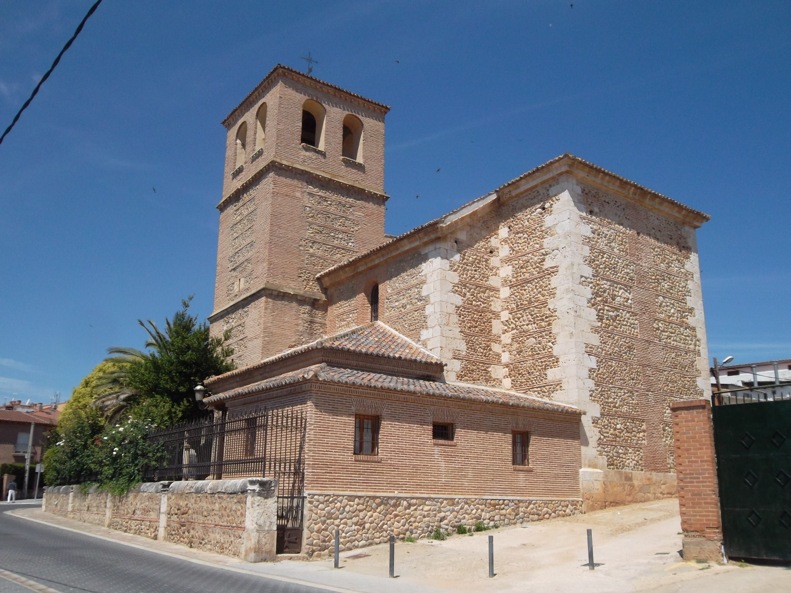 Azuqueca-Iglesia de San Miguel, templo del siglo XVI renacentista de carácter rural.